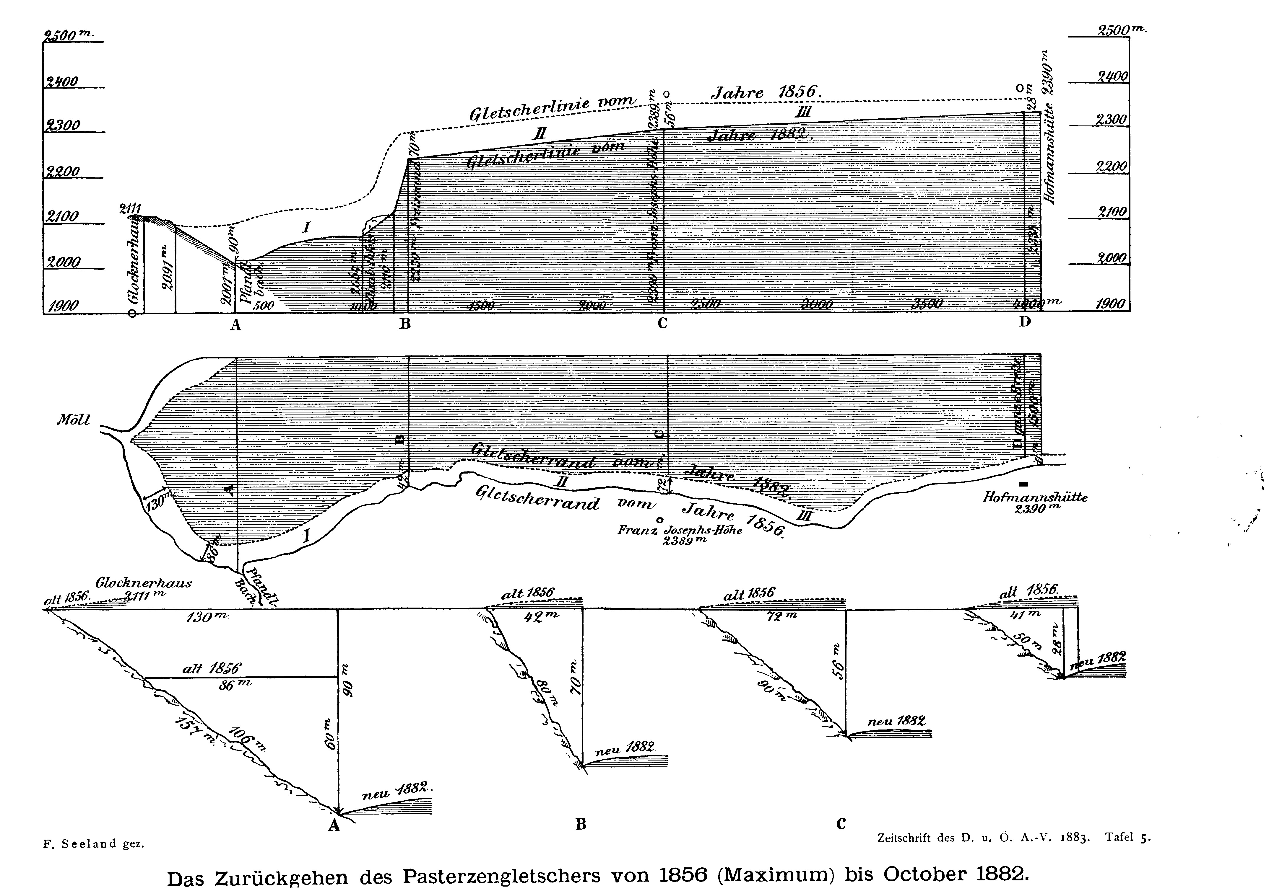 Das Zurückgehen des Pasterzengletschers von 1856 (Maximum) bis October 1882 aus Zeitschrift des Deutschen und Oesterreichischen Alpenvereins 1883 Band 14